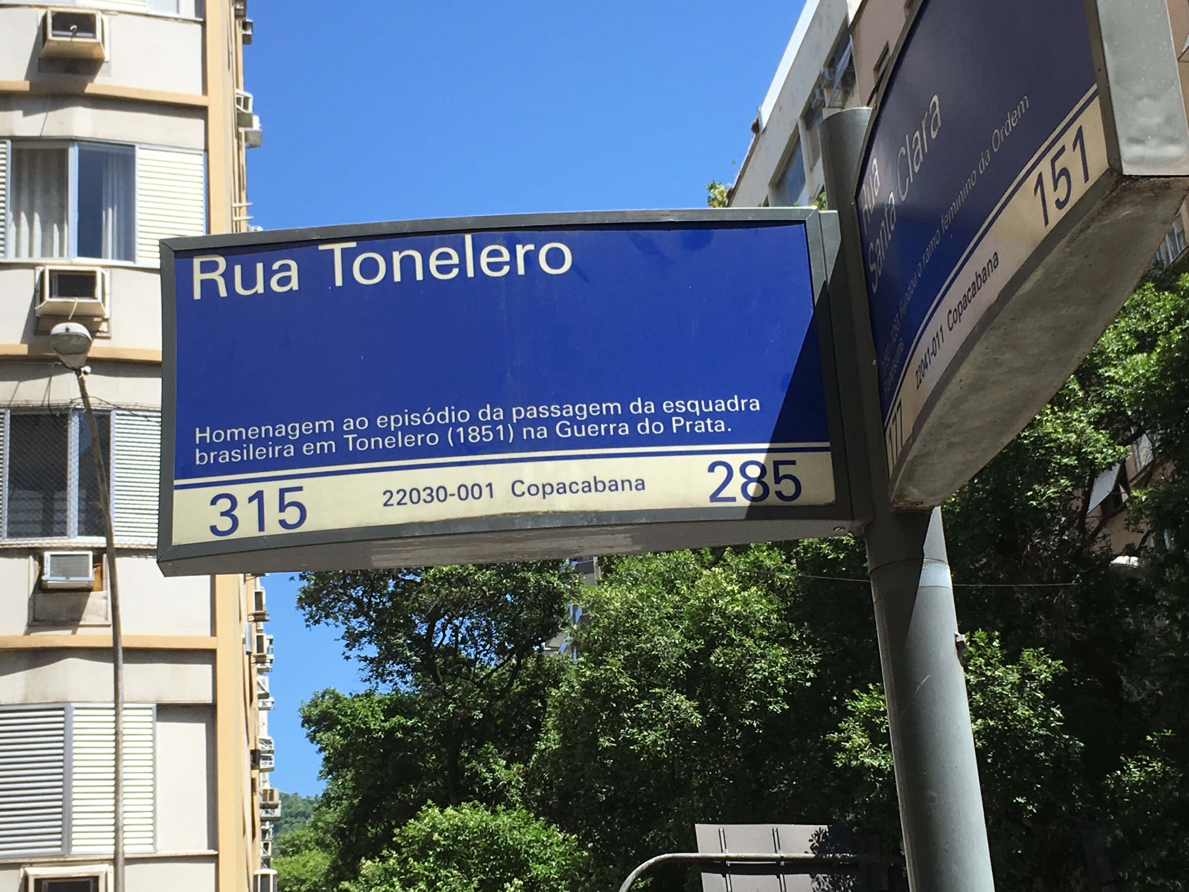 Esquina da Rua Tonelero com Rua Santa Clara